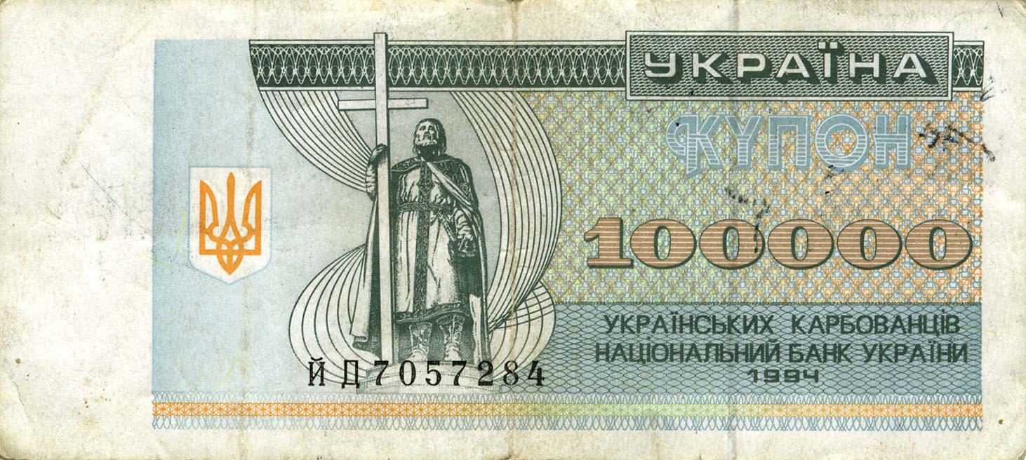 Банкнота Украины. Купон на 100000 карбованцев. 1994 год